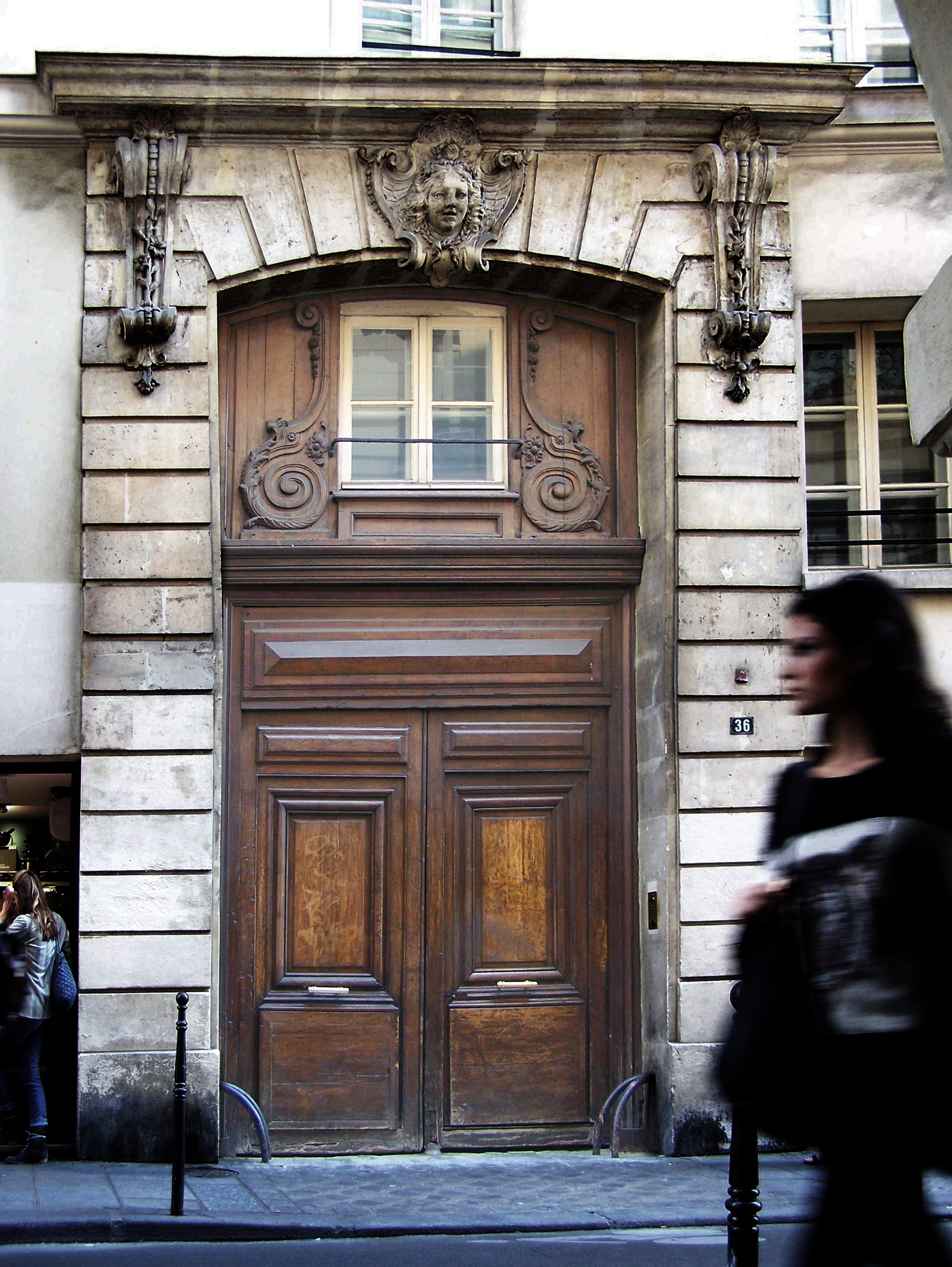 Maison (Inscrit) à Paris (75004), rue Vieille-du-Temple, nº36. Porche monumental .